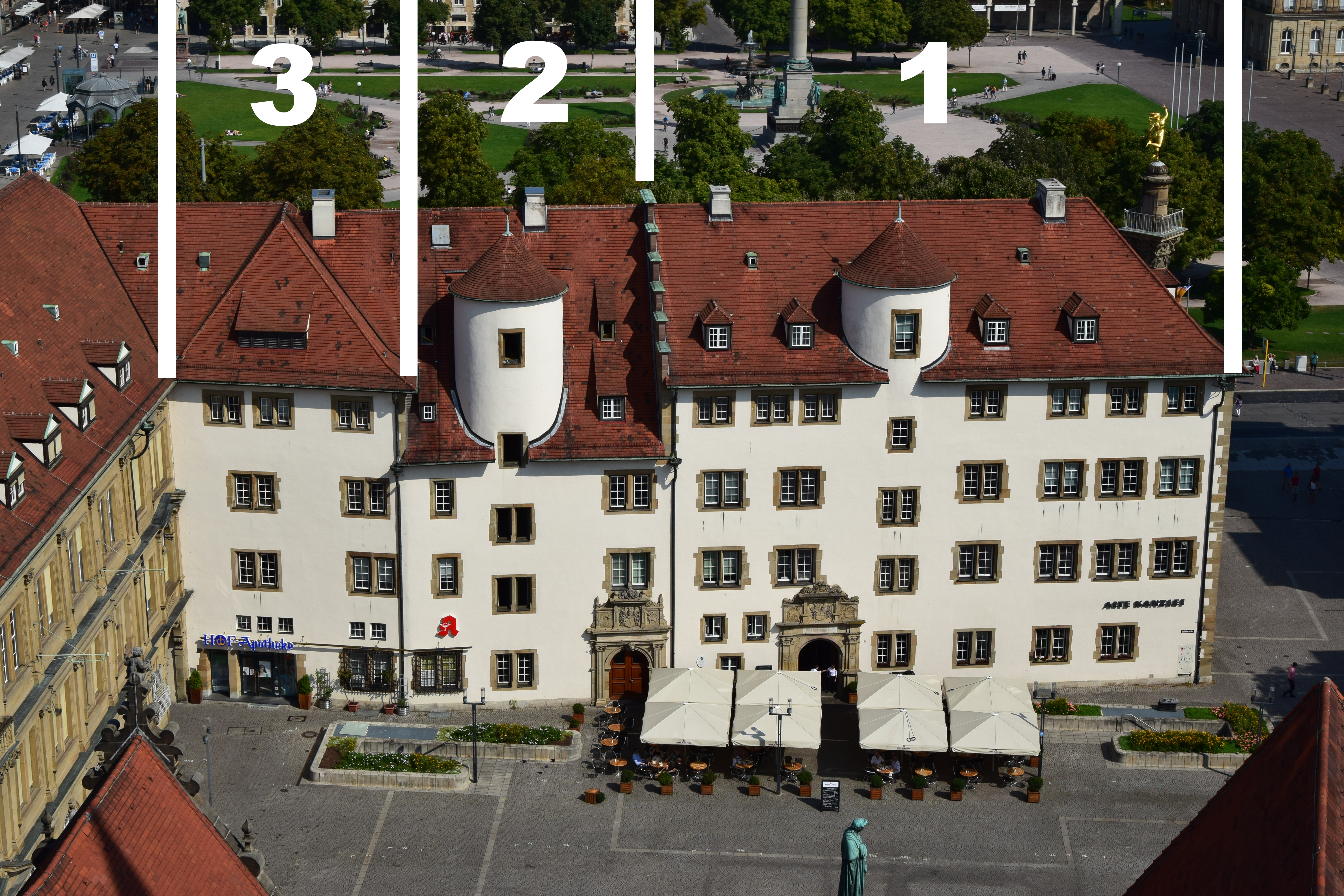 Alte Kanzlei in Stuttgart vom Turm der Stiftskirche aus gesehen. Ecke unten links: Bacchusfigur auf dem First des Fruchtkastens.